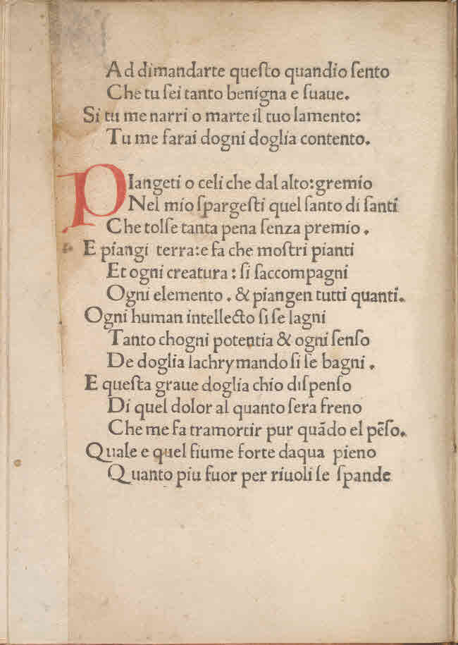 Il pianto della Vergine Maria. Segue: Gratiarum actio (italiano); Bonino Mombrizio: In Virginem matrem (latino). - [Milano] : Hic liber impresus celebri fuit arte Philippi de Lavaniae, [circa 1478]. - 42 c. ; [a-e⁸, f²] ; 4º .